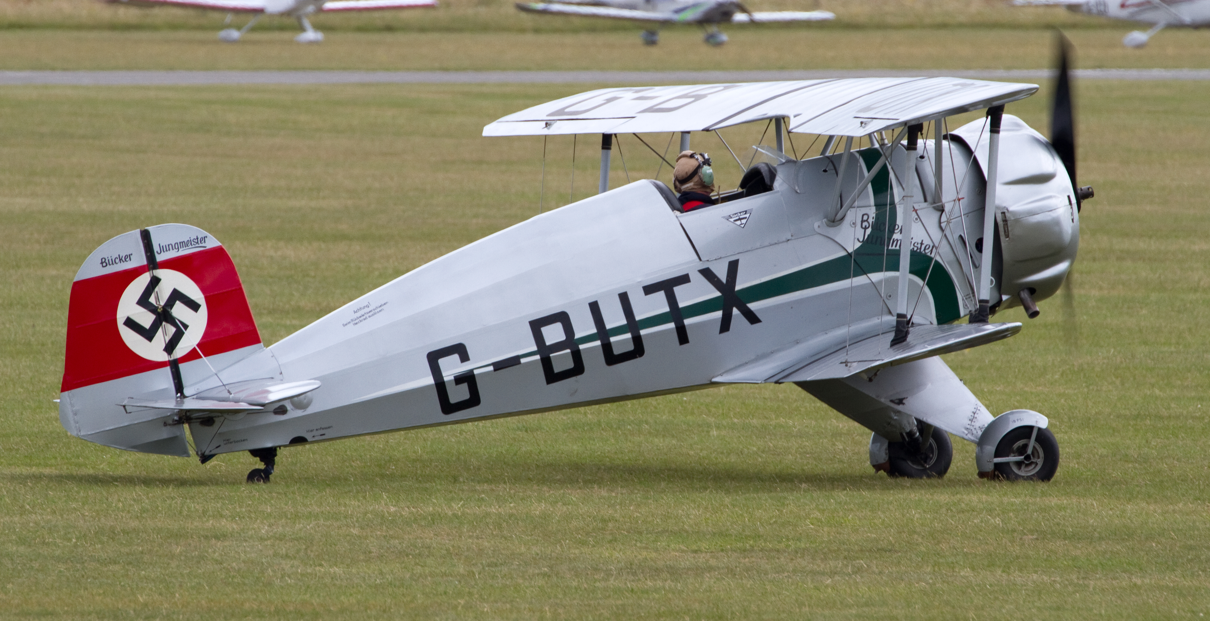 Bücker Bü133 Jungmeister